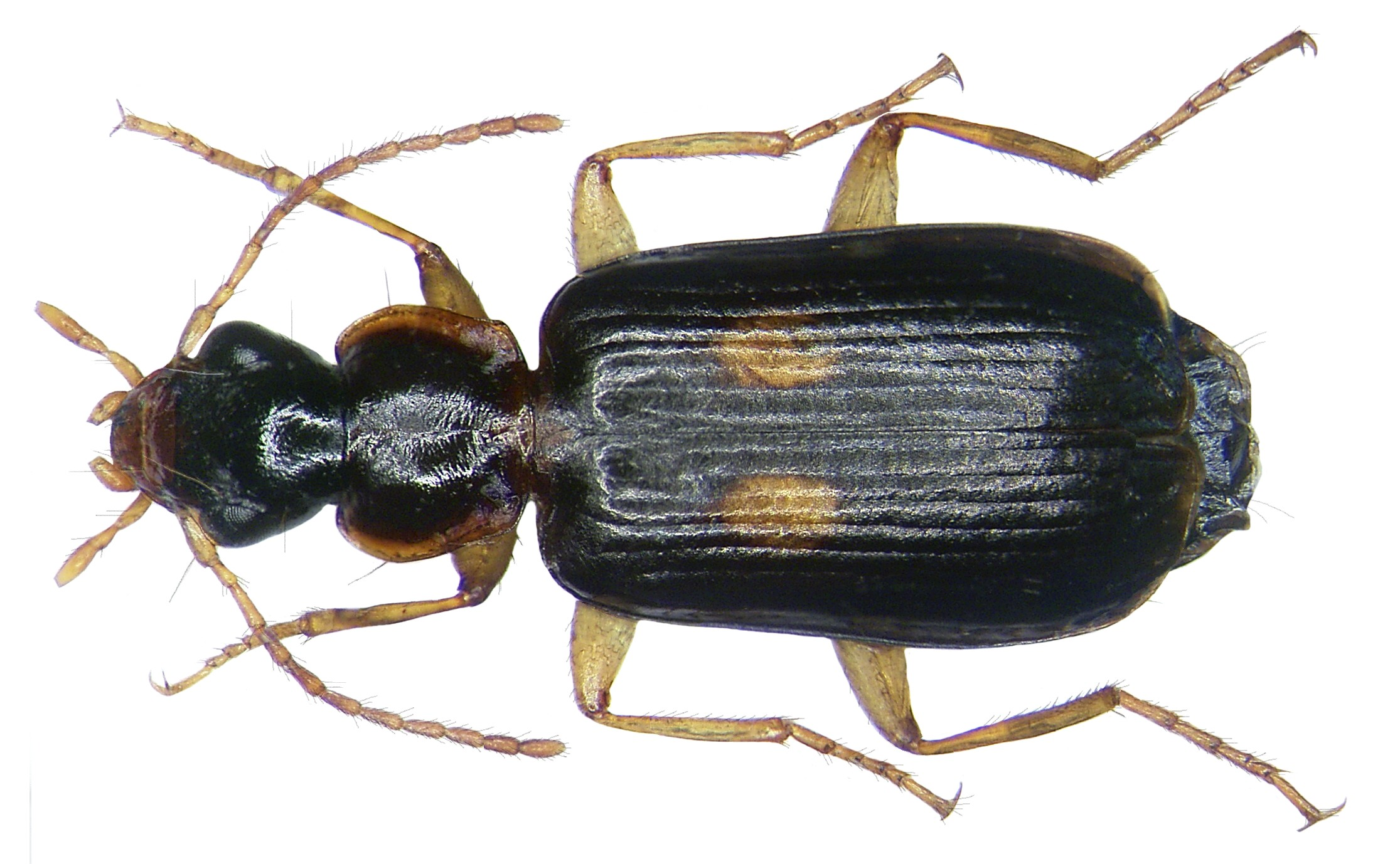 Familie: Carabidae Grösse: 5-6,5 mm Verbreitung: Europa Fundort: Germania, Oberfranken, Selbitz leg.det. U.Schmidt, 2005 Foto: U.Schmidt, 2007